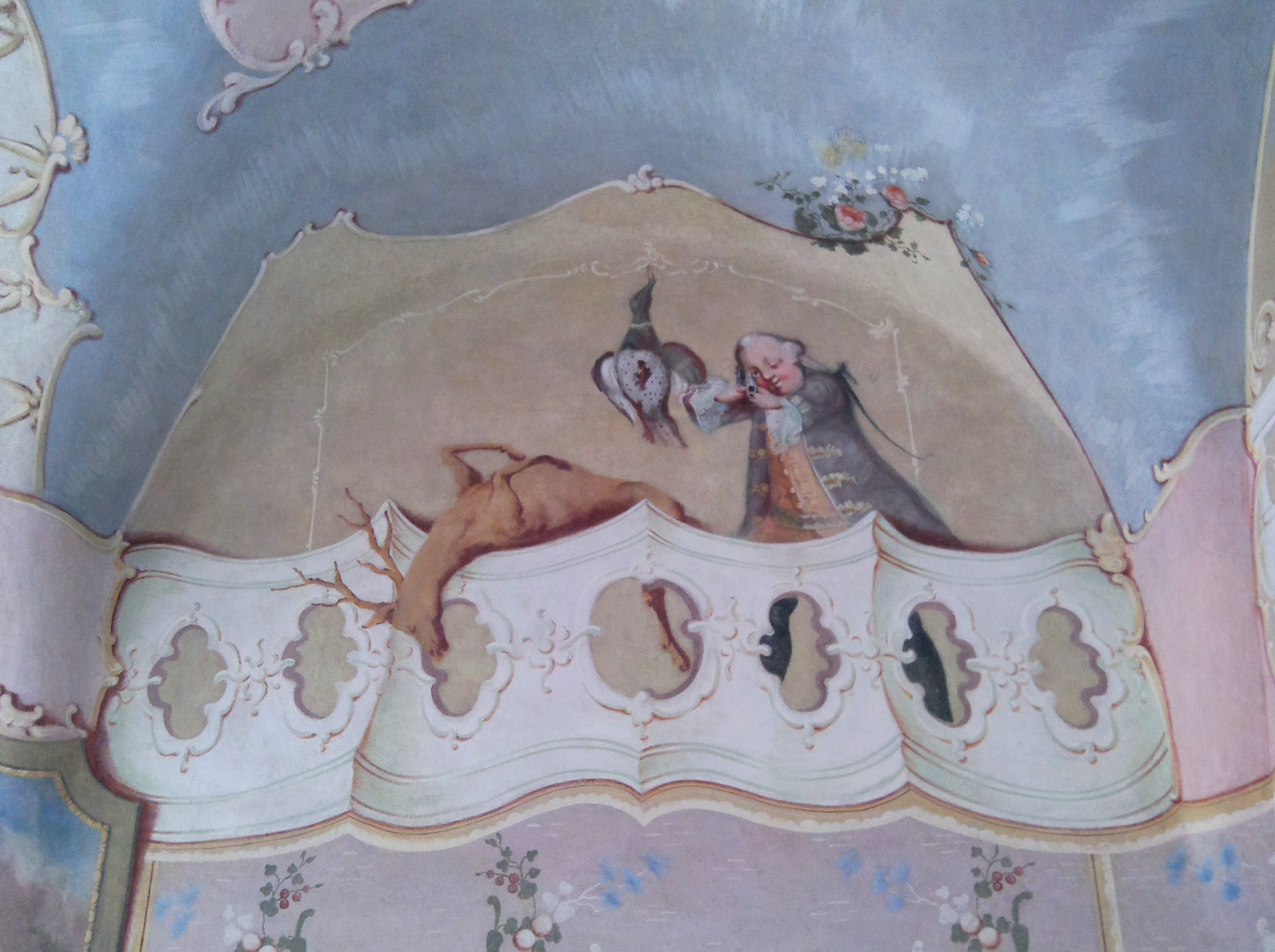 L’Huillier-Coburg-kastély freskói This is a photo of a monument in Hungary. Identifier: 2726